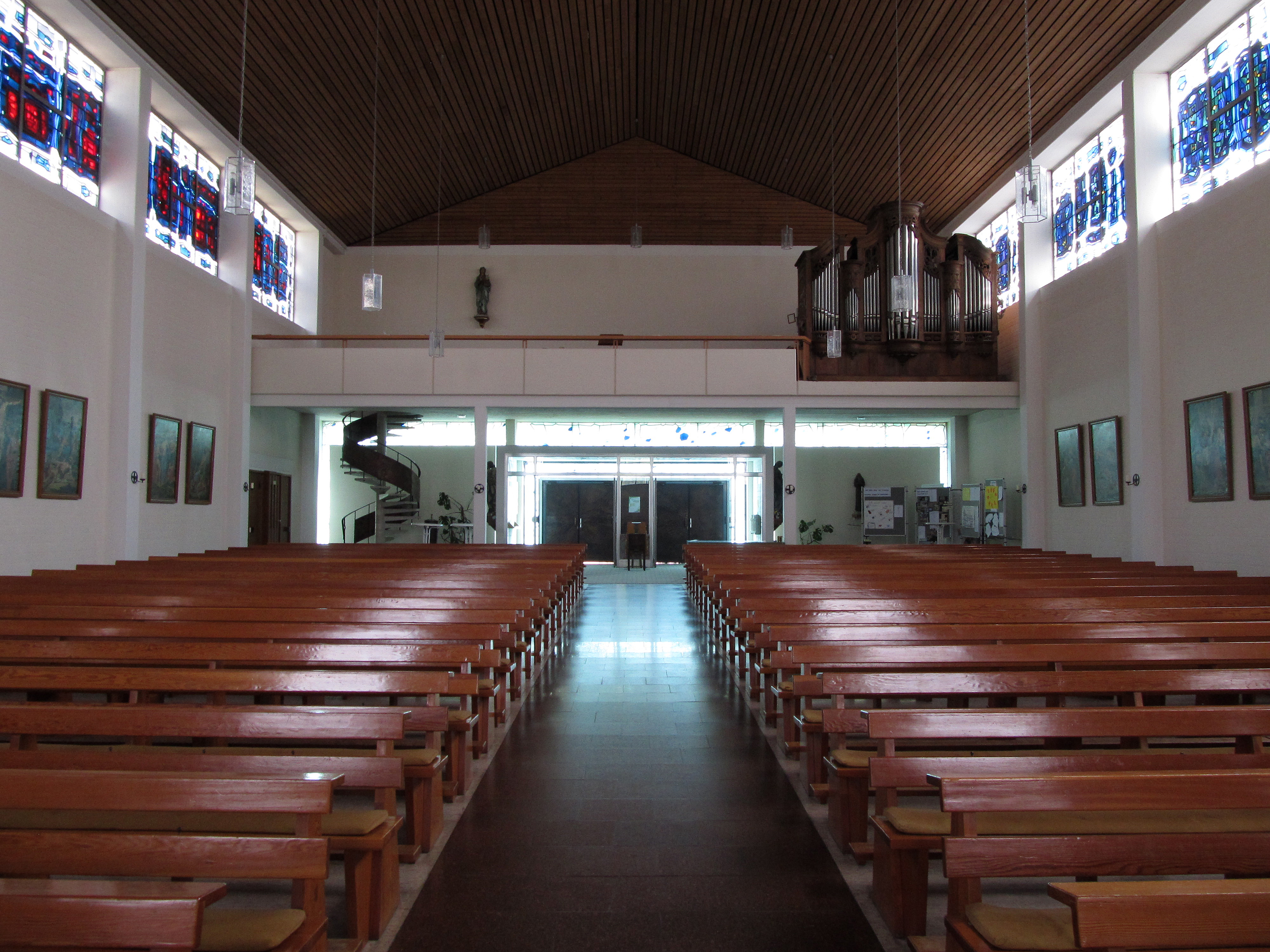 Blick ins Innere der katholischen Pfarrkirche Mariä Heimsuchung in Ommersheim, Mandelbachtal, Saarland